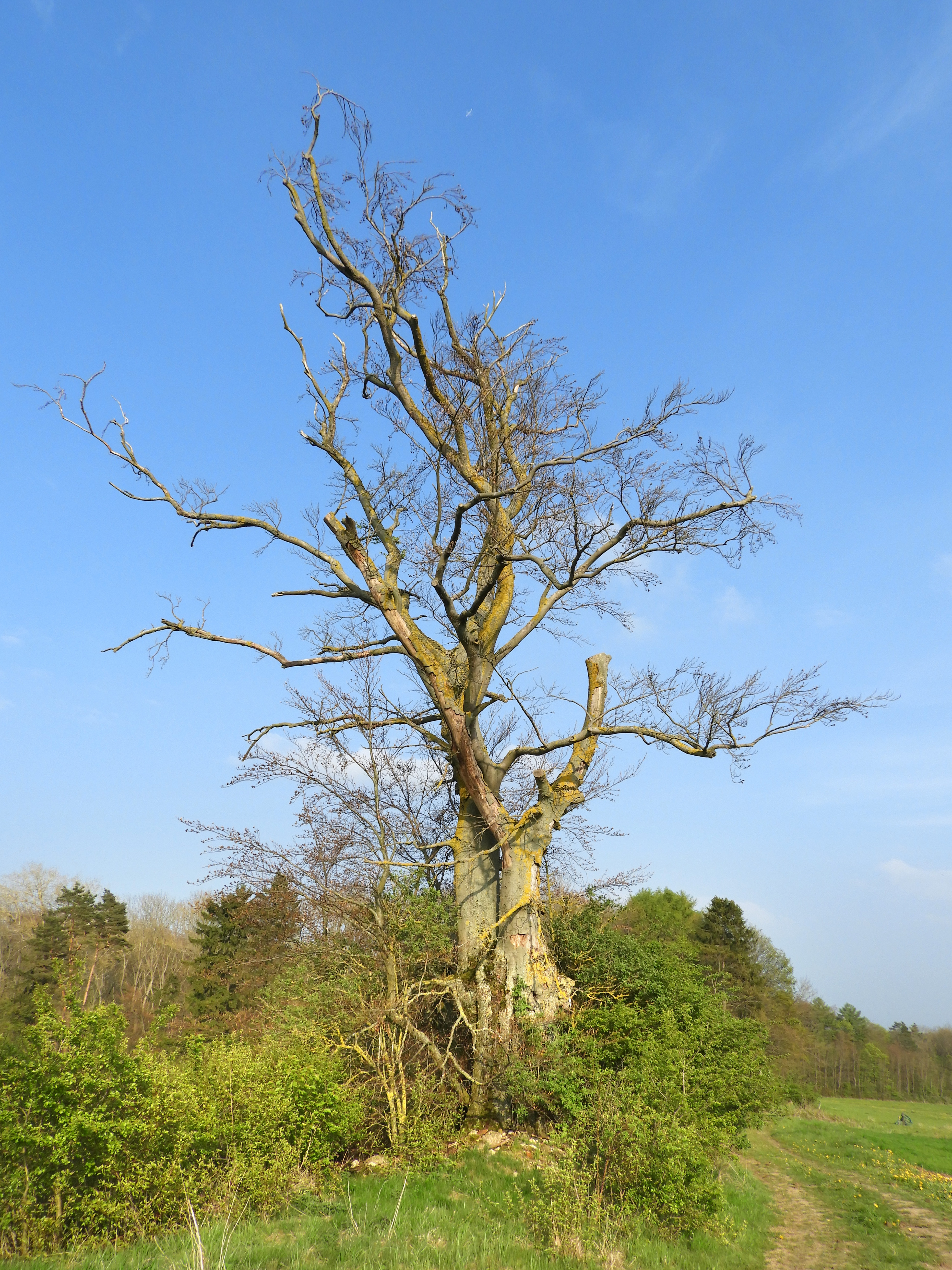 Alte Triftbuche bei Renda (Naturdenkmalnummer 636.632) – Die Buche steht am höchsten Punkt des alten Verbindungsweges von Renda (Ringgau) nach Markershausen (Herleshausen) in der Nähe der Gemarkungsgrenze.